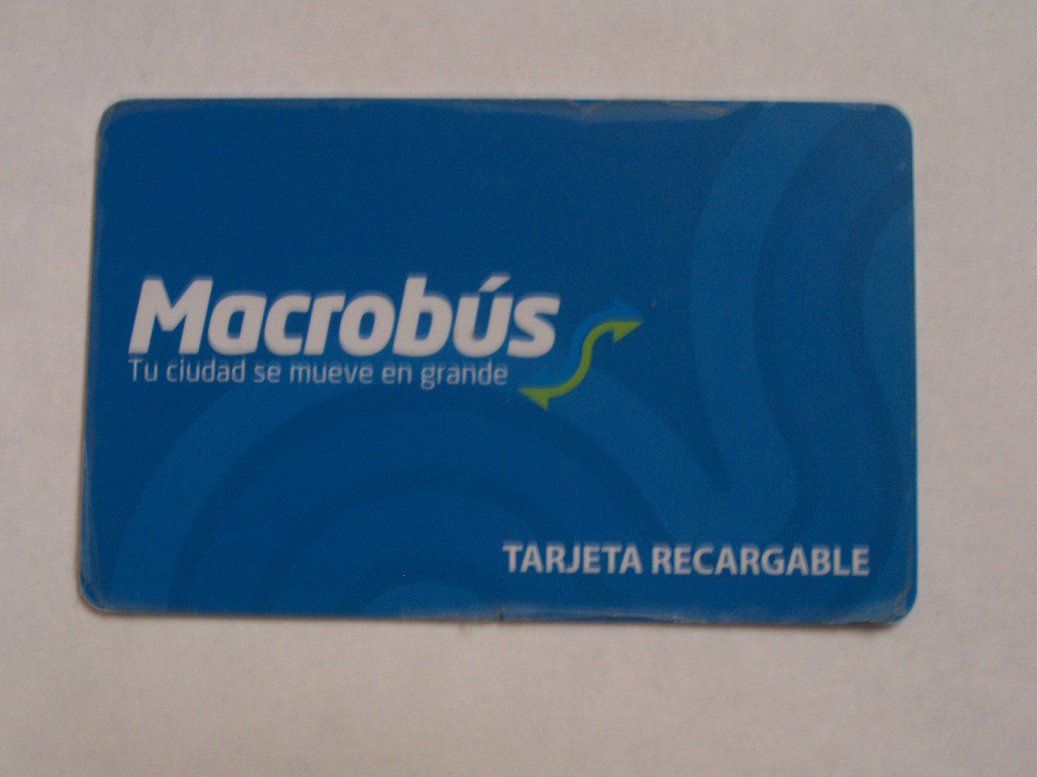 Tarjeta de Prepago de Macrobus